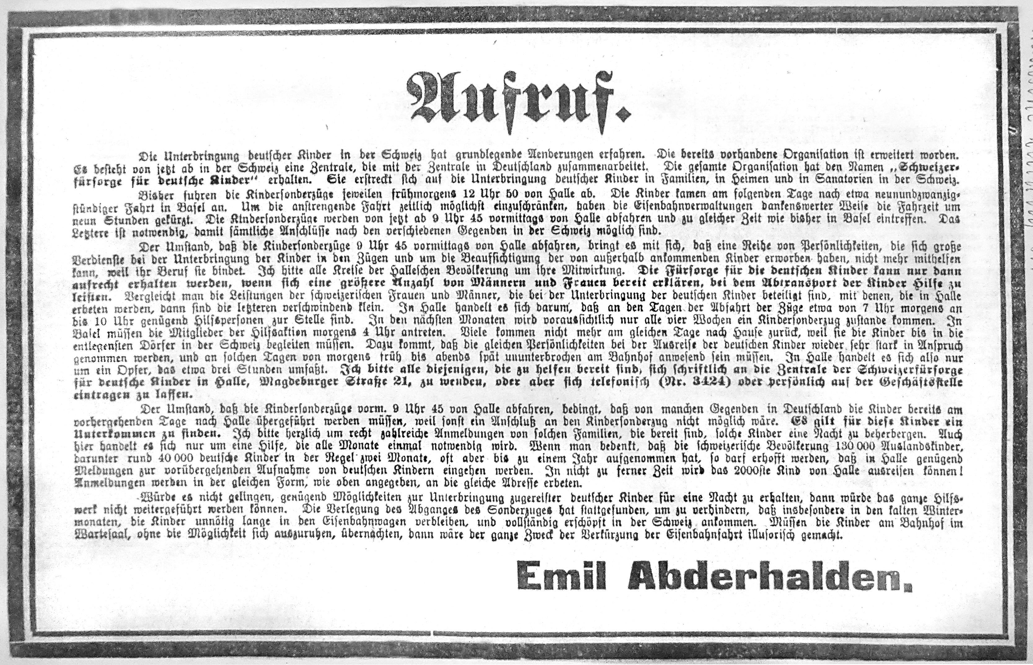 Inserat in der Halleschen Zeitung vom 16. 10 1620